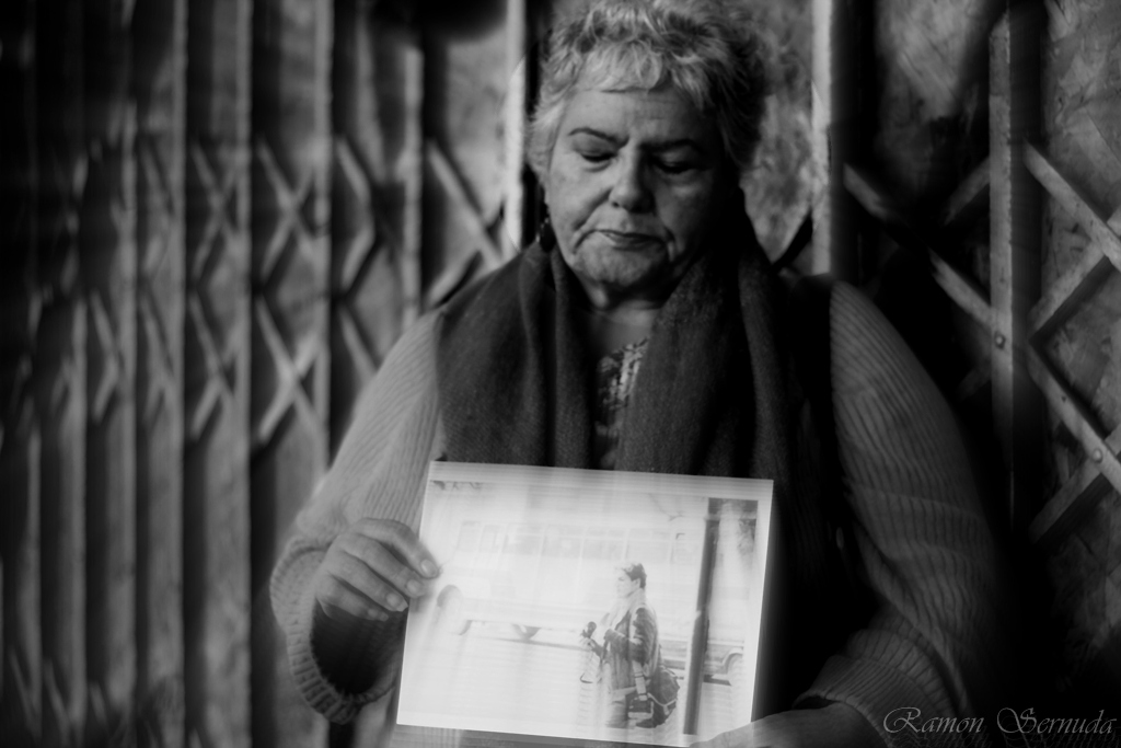 Verónica De Negri con una foto de su hijo Rodrigo, fotógrafo que fue quemado vivo por militares chilenos bajo la dictadura del general Augusto Pinochet.